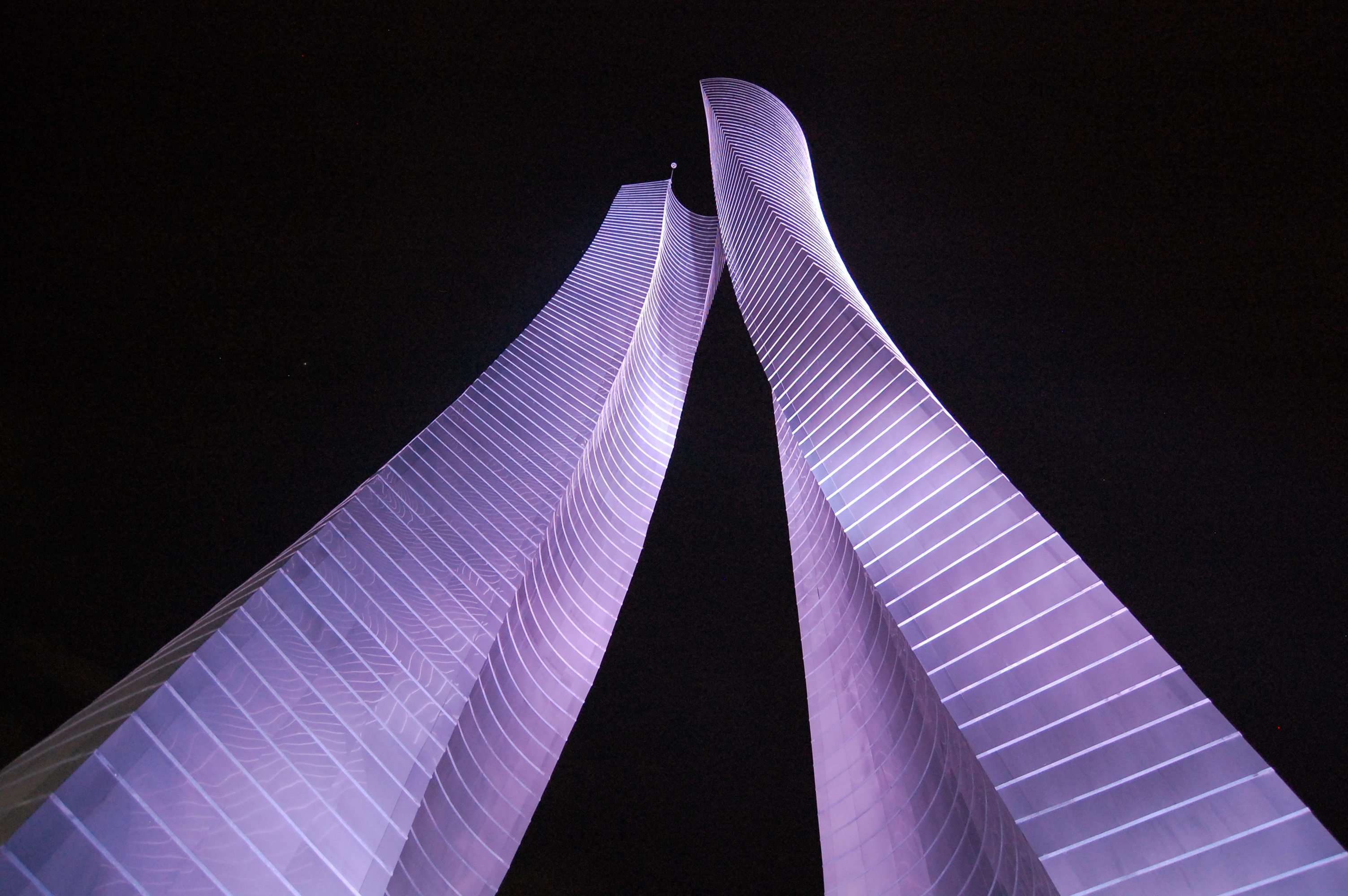 Torres Bicentenario, Toluca de Lerdo, Estado de México, México.